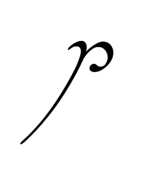 Cursiva tinco